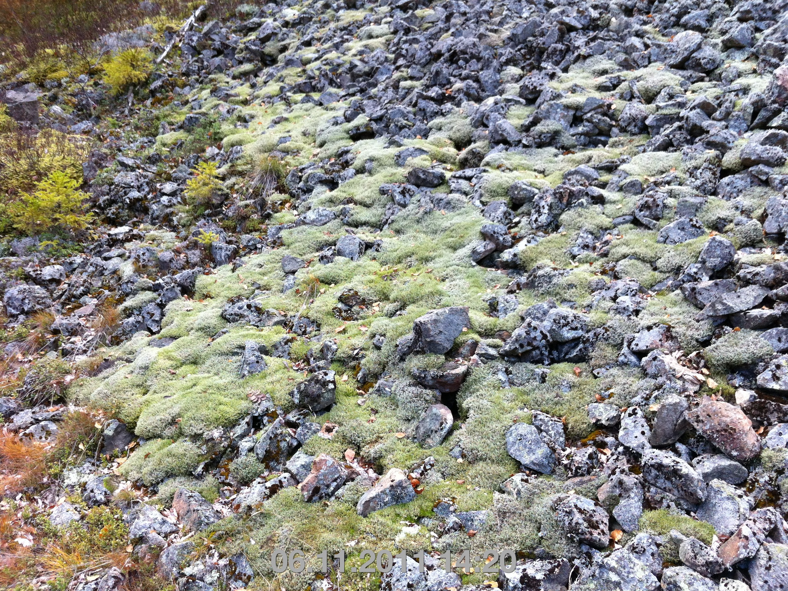 Moos auf einer Blockhalde im Gletscherkessel Präg